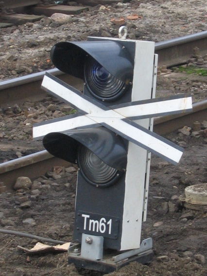 unieważniona (wskaźnikiem W31) tarcza manewrowa Tm61 na stacji Poznań Główny